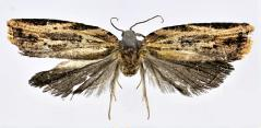 Isodemis hainanensis